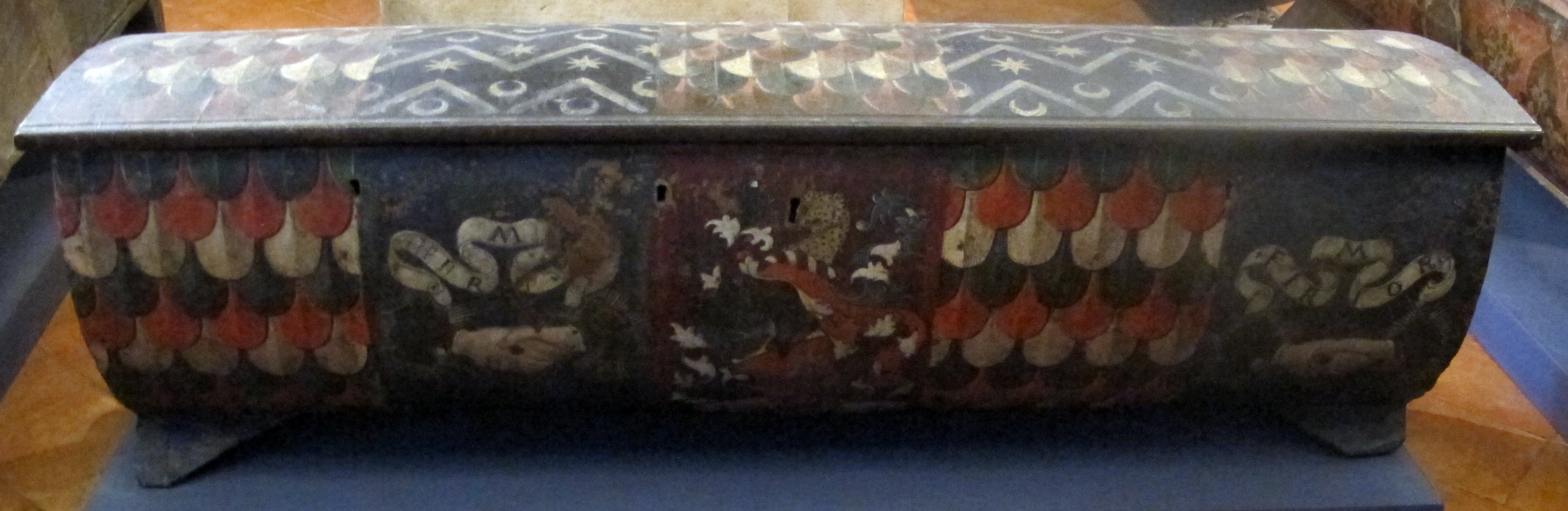 Museo Bardini